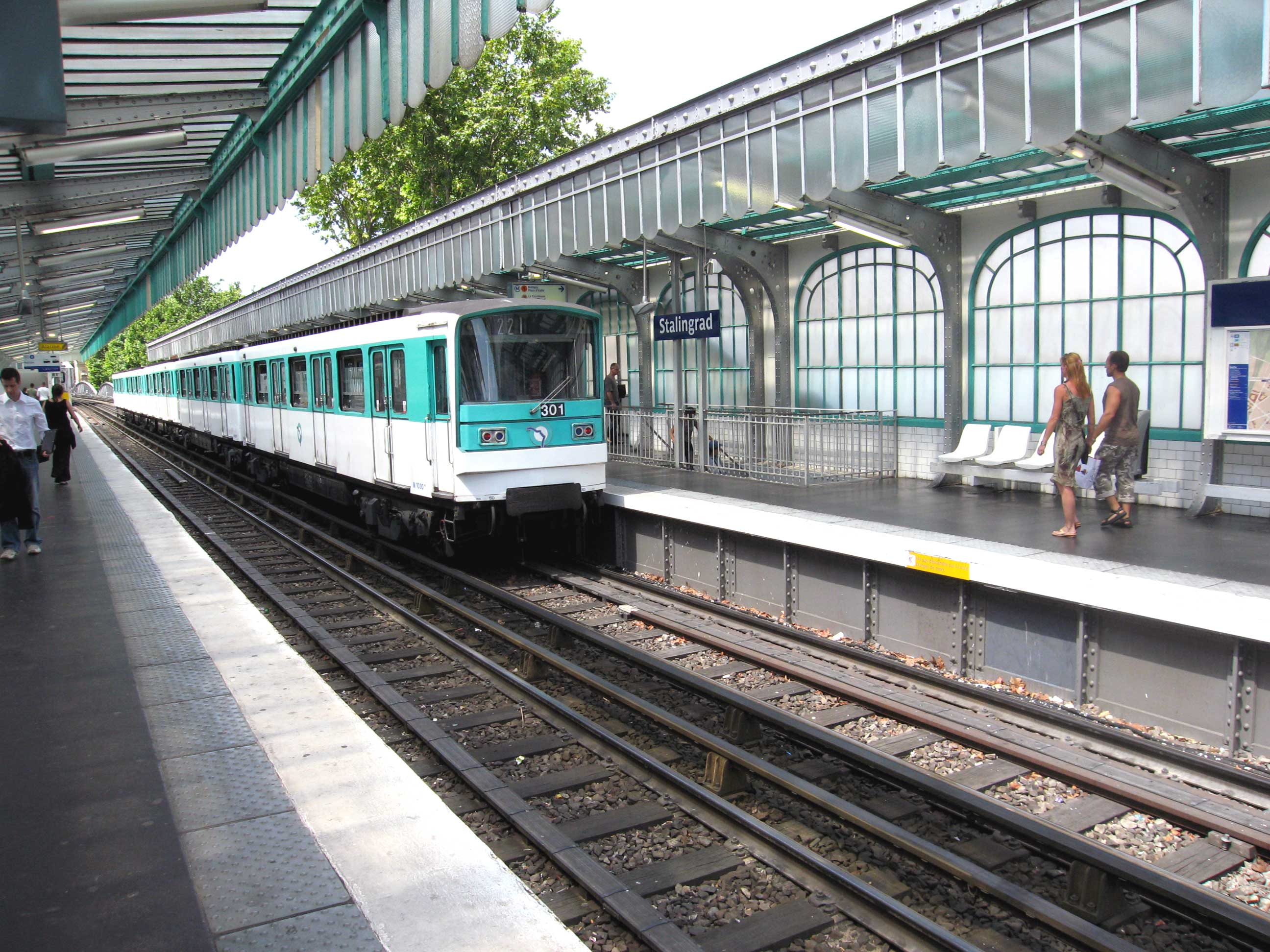 Description : Rame MF67 de la ligne 2 du métro à la station aérienne de Stalingrad Date : juillet 2006 Author : Pline photo personnelle